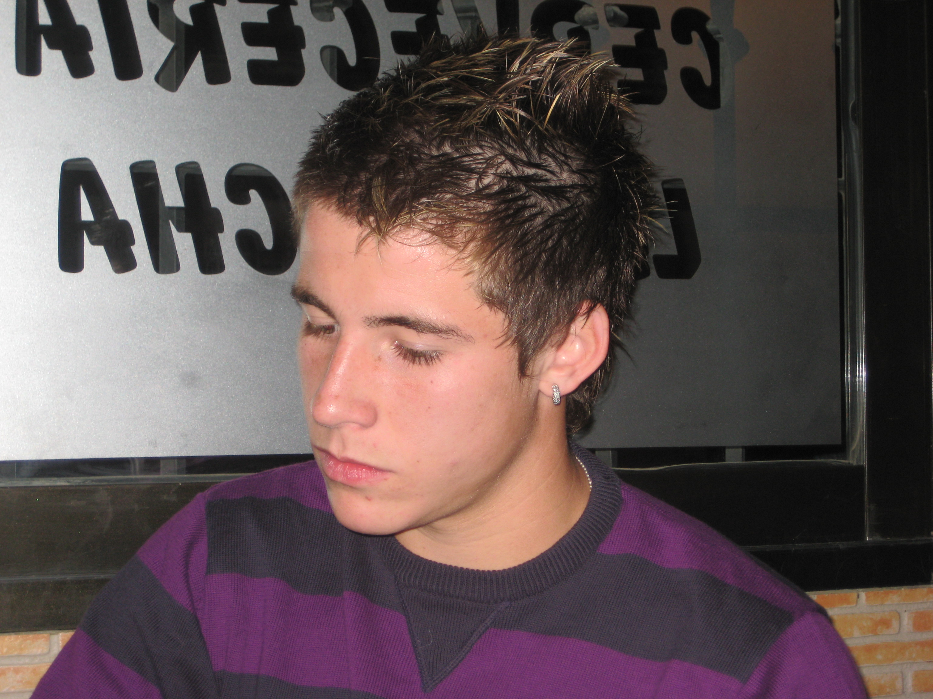 Daniel Aquino Pintos durante una entrevista en Murcia